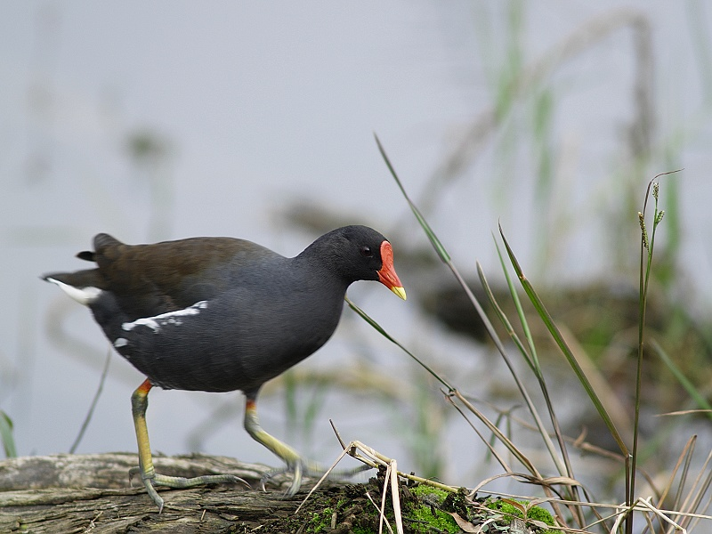 紅冠水雞、Gallinula chloropus